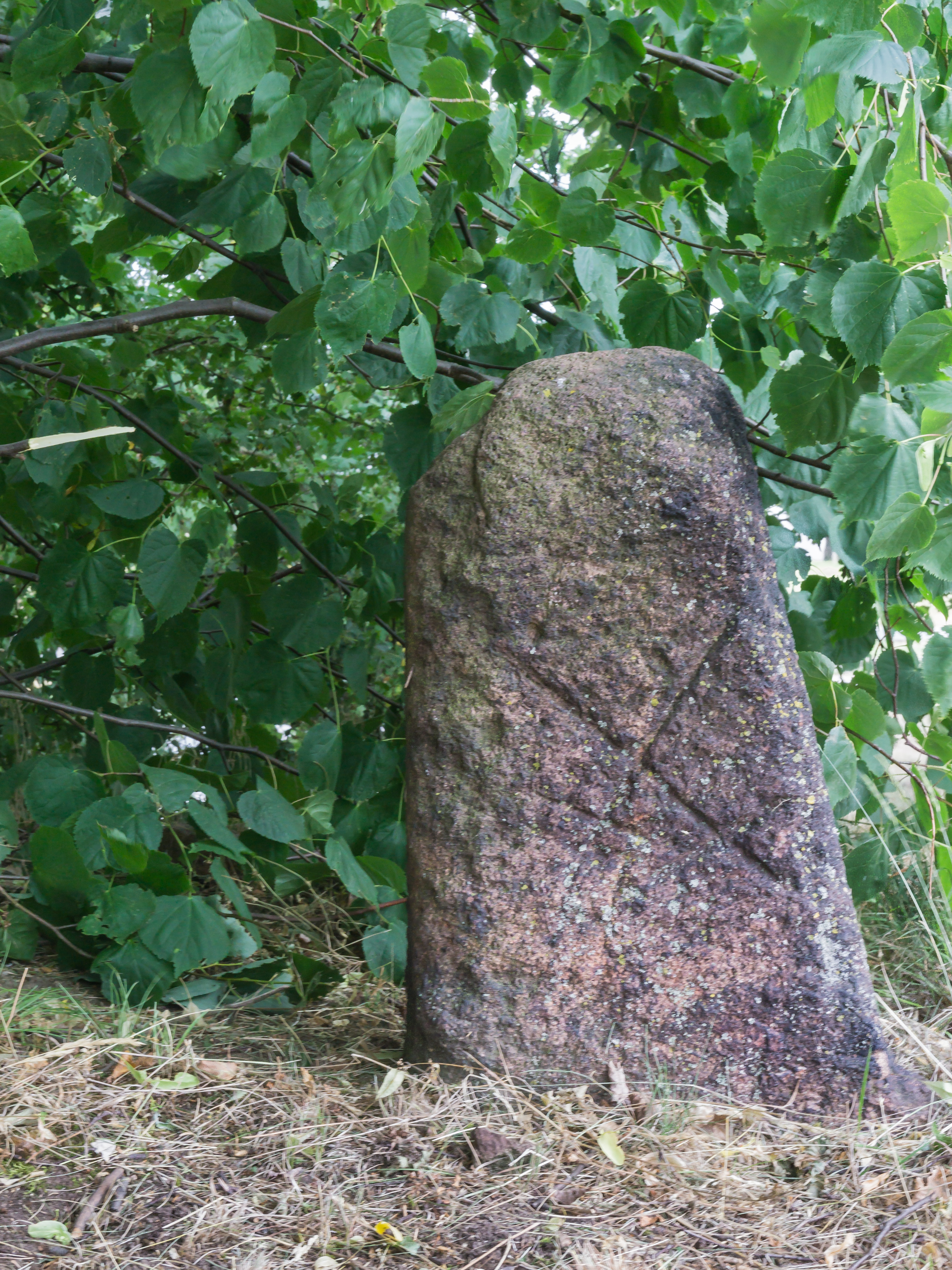 Gemarkungsstein mit gekreuzten Schwertern an der B 107 in Königsfeld OT Seupahn. Bemerkung: Der Gemarkungsstein steht unmittelbar neben einem Steinkreuzstumpf mit Ritzzeichnung eines Schwertes